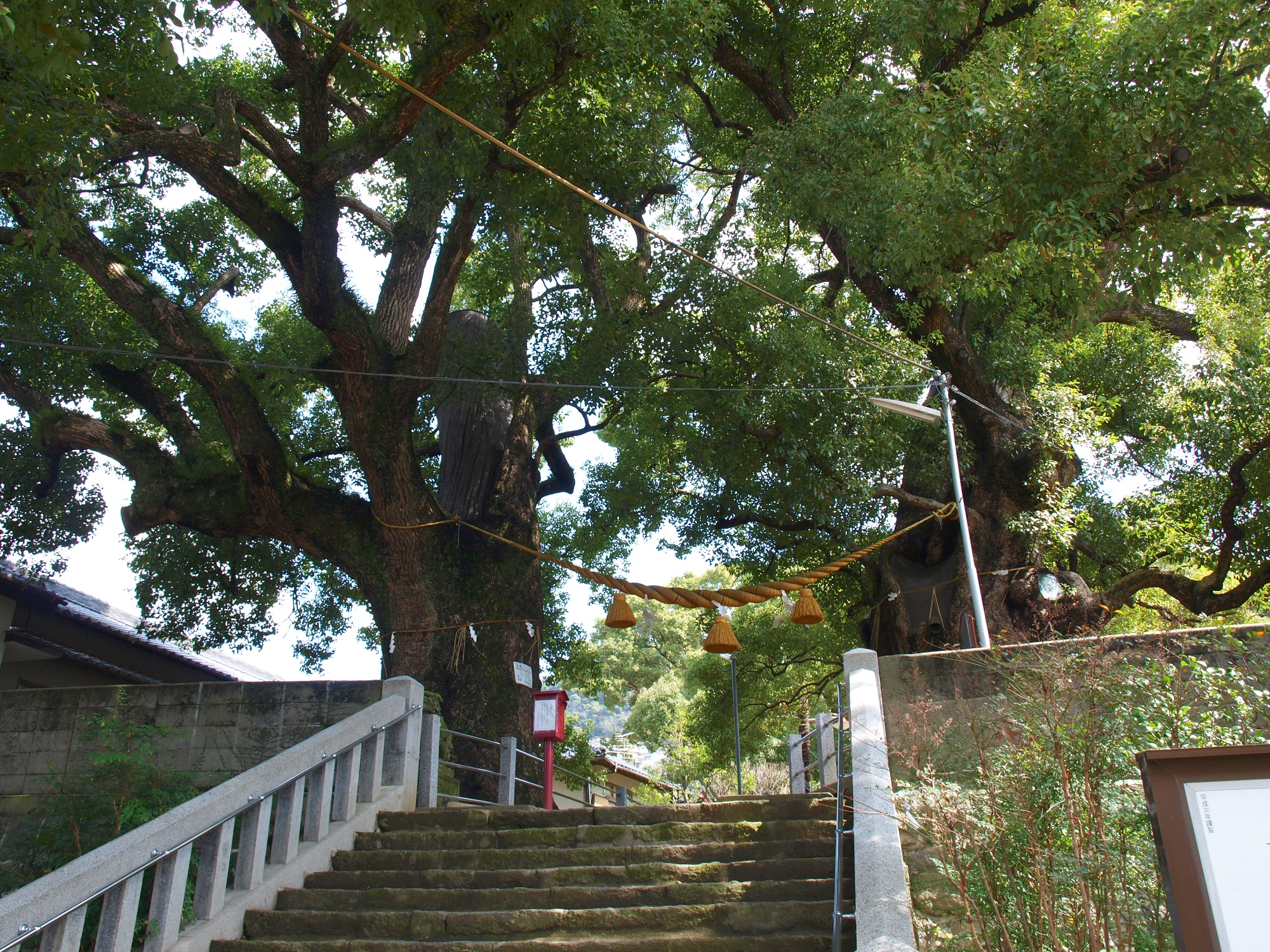 長崎県長崎市 山王神社 被爆楠